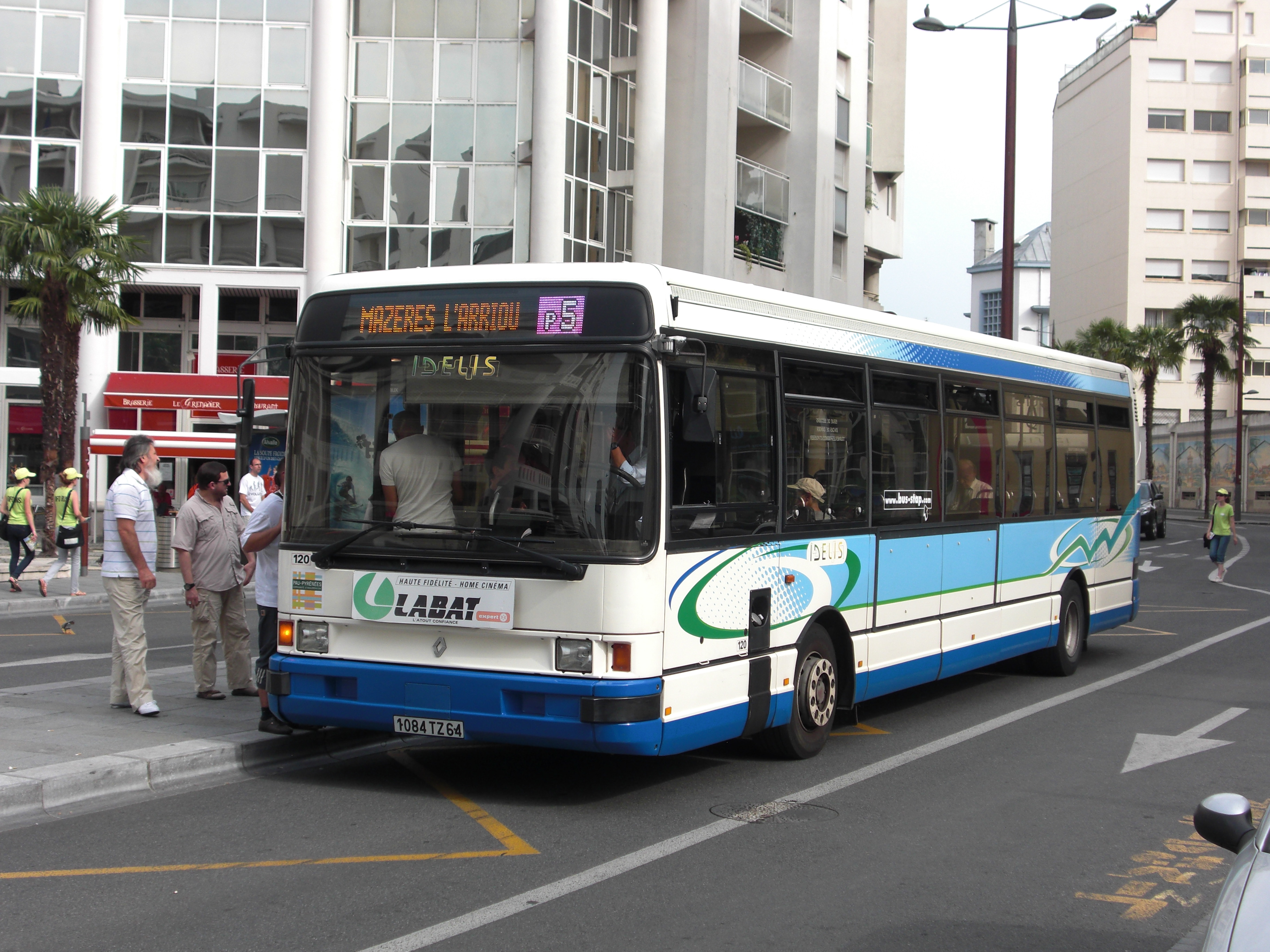 Bus du réseau Idelis à Pau sur la ligne P5 au Pôle Bosquet